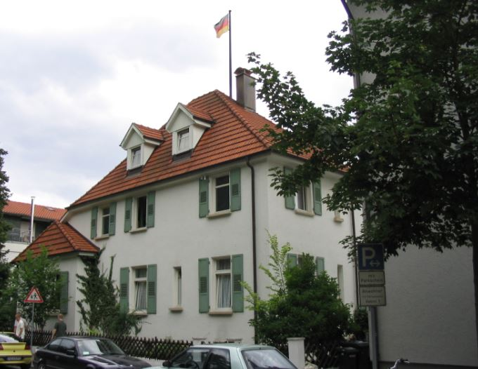 Das 1906 gebaute Wohnhaus in der Tübinger Gartenstraße wurde 1950 von dem Juristen und Politiker (Weimarer Reichsminister) Hermann Dietrich (1879-1954) erworben und der Straßburger Burschenschaft Arminia zu Tübingen gestiftet. Nach ihm wird es auch Hermann-Dietrich-Haus genannt.